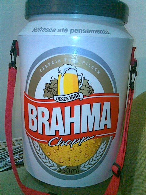 Foto de uma lata de Brahma que na verdade é um cooler.